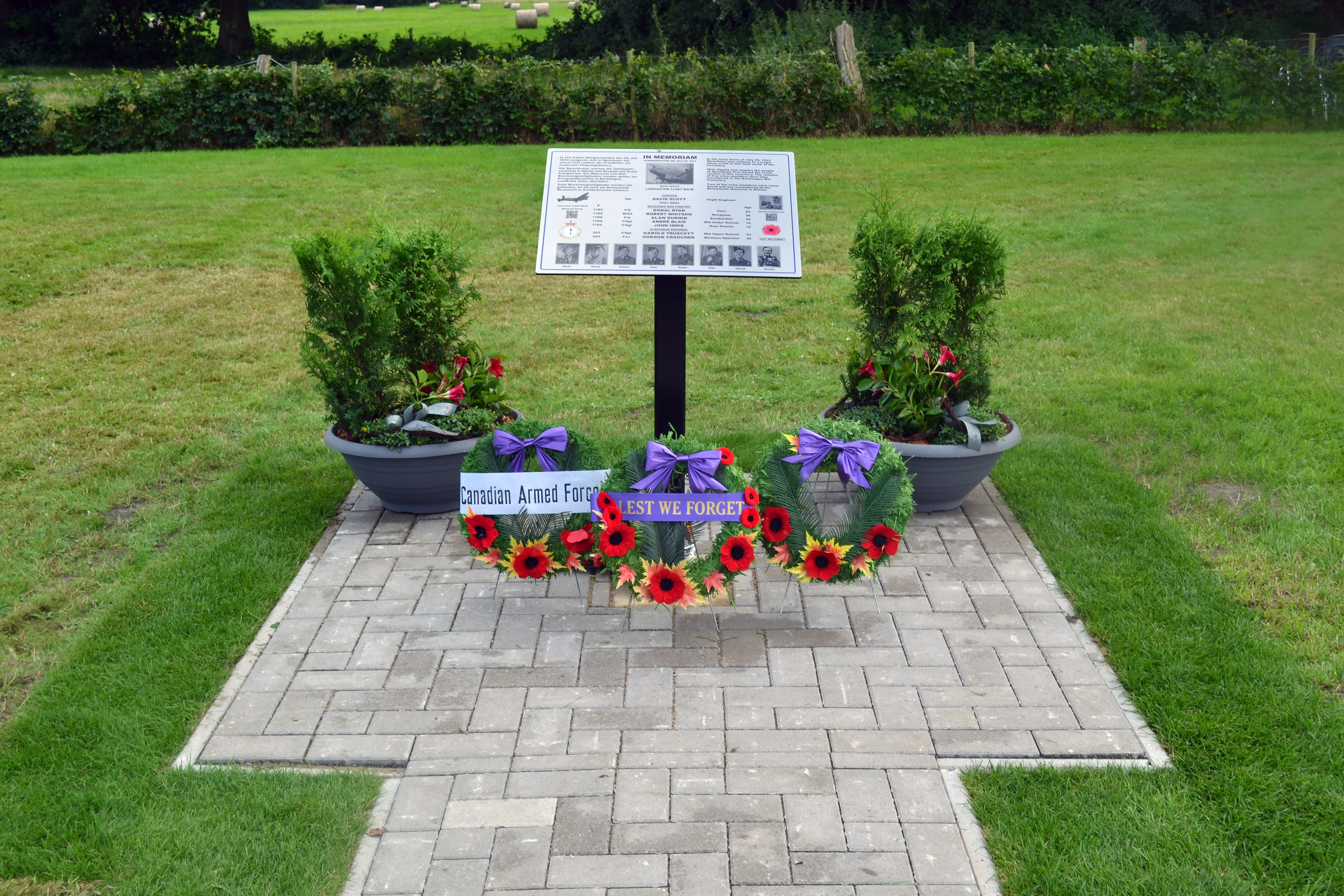 Dieses Bild zeigt eine Gedenktafel bezüglich des Absturzes einer Avro Lancaster des Typs II (LL687 EQ-M) am 29. Juli 1944 im Ortsgebiet von Spreckens, Bremervörde, Niedersachsen. Die Gedenktafel befindet sich mittig-östlich im Ort auf dem lokalen Friedhof und ist in Richtung der etwa 500 Metern entfernten Absturzstelle ausgerichtet.